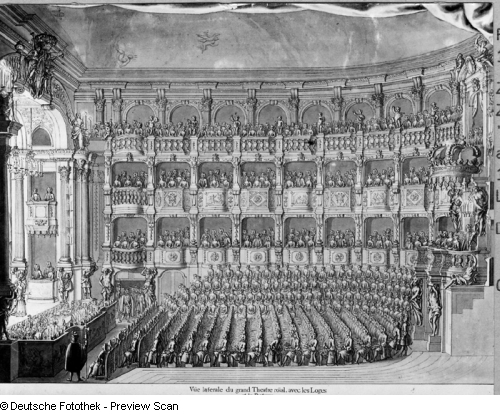 Opernhaus am Zwinger, Längsschnitt durch den Zuschauerraum. Der Kupferstich zeigt die Aufführung der Oper "Teofane" von Pallavicini und Lotti anläßlich der Vermählung des Kurprinzen Friedrich August II.. Staatliche Kunstsammlungen Dresden, Kupferstichkabinett, Inv.-Nr. Sax. top. Ca 200/14.